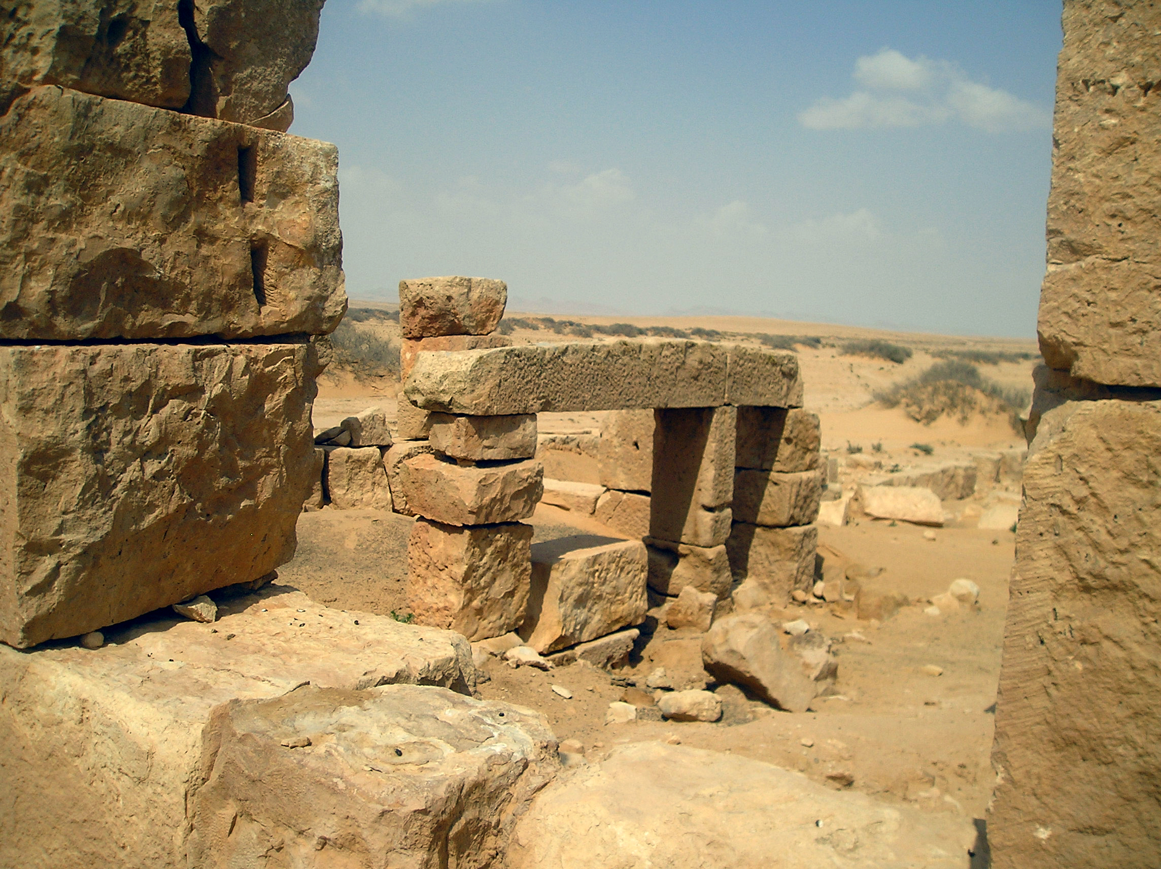 Castellum Benia Guedah Ceder: Blick von Süden nach Norden ins Innere des Hauptgebäudes. Mächtige Werksteine bilden Türstürze, 2014.